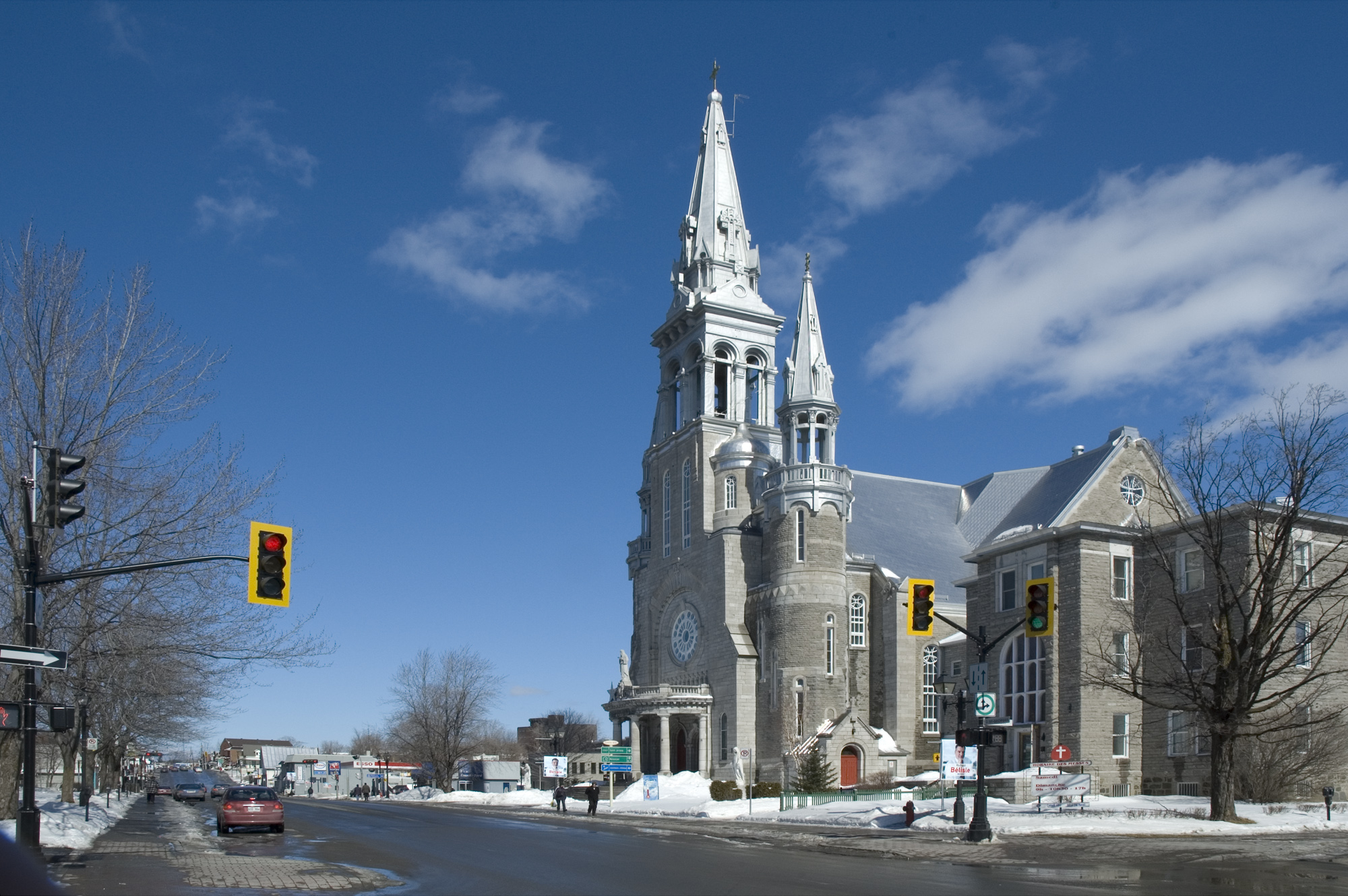 Saint-Jérôme, au Québec. Centre ville, la cathédrale